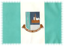 Bandeira do município de São Miguel dos Campos, Alagoas, Brasil.